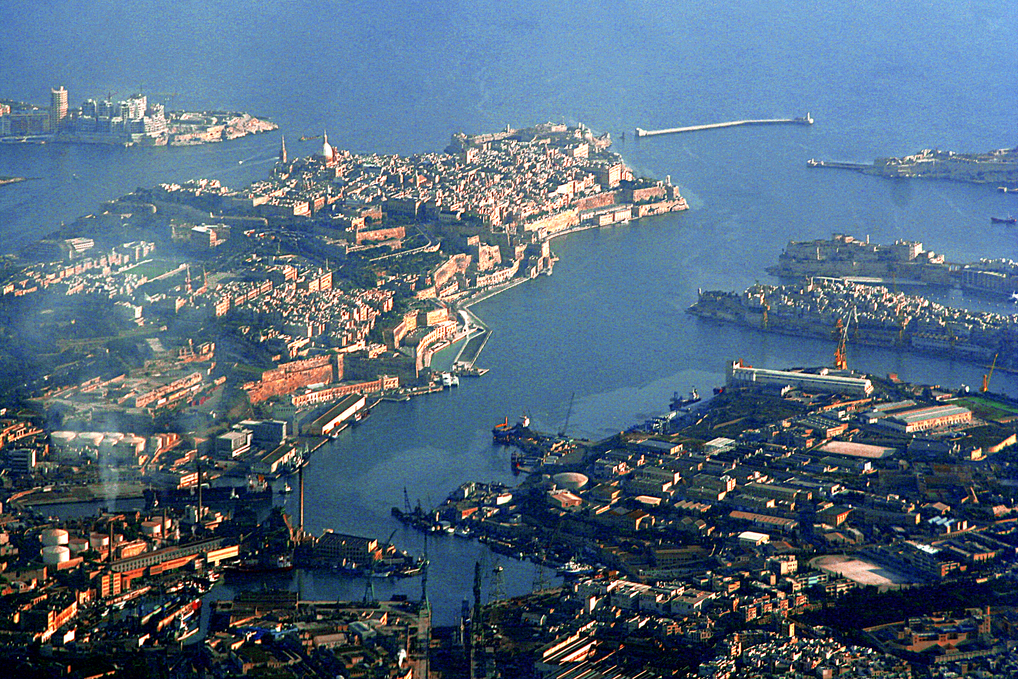 vue aérienne de Valletta et Grand Harbour